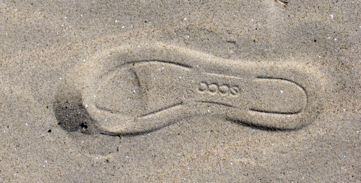 Ecco-skoaftryk.